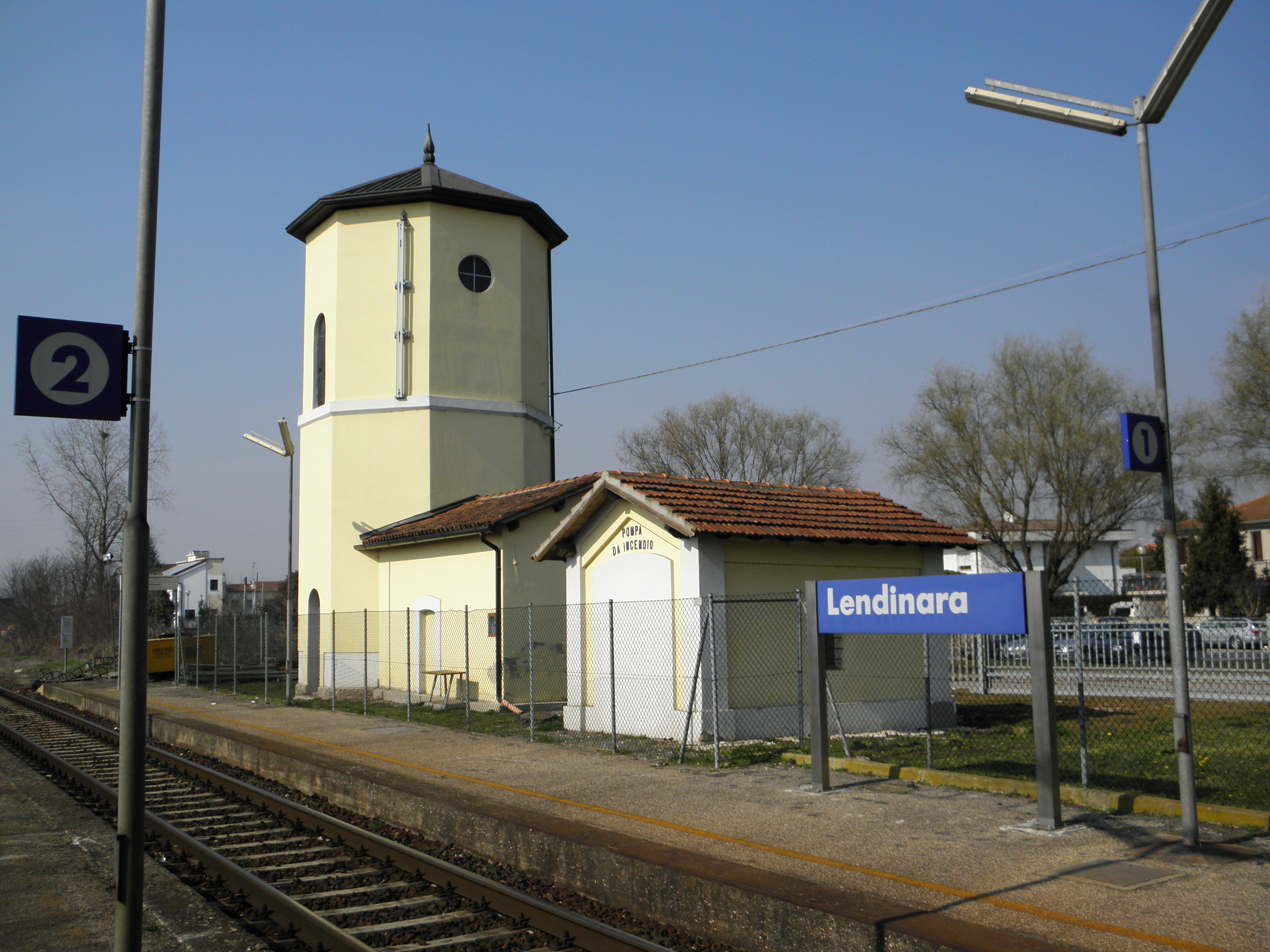 Lendinara, stazione ferroviaria: pompa antincendio e colonna idraulica.